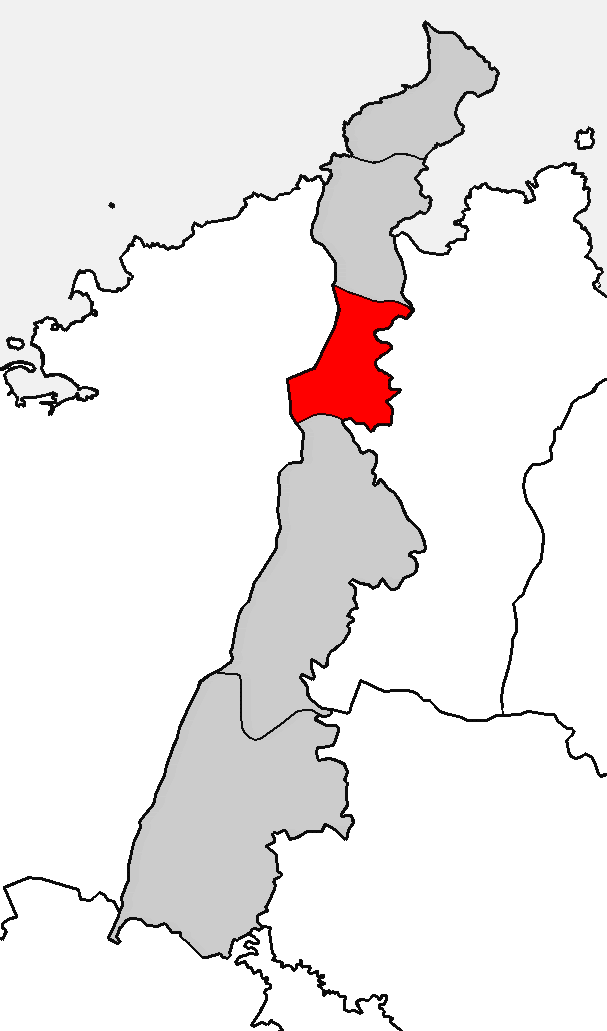 Situación da parroquia das Ribeiras do Sor no concello de Mañón